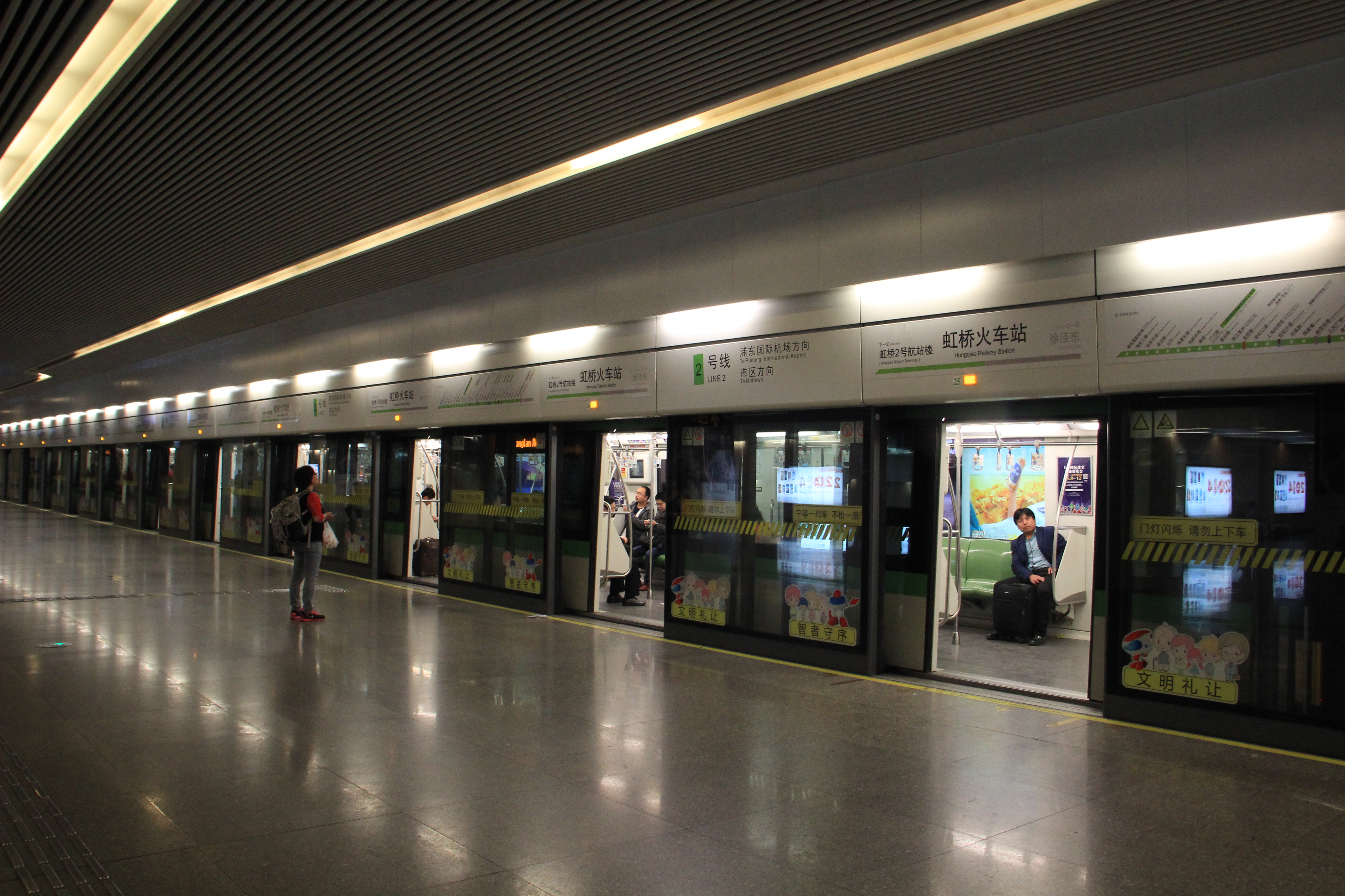 虹桥火车站2号线站台与列车